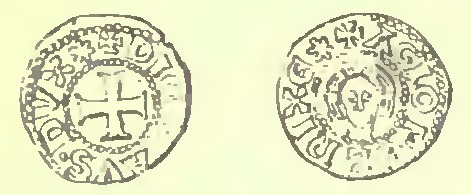 "Rivista italiana di numismatica", a numismatic magazin of "Società Numismatica Italiana"